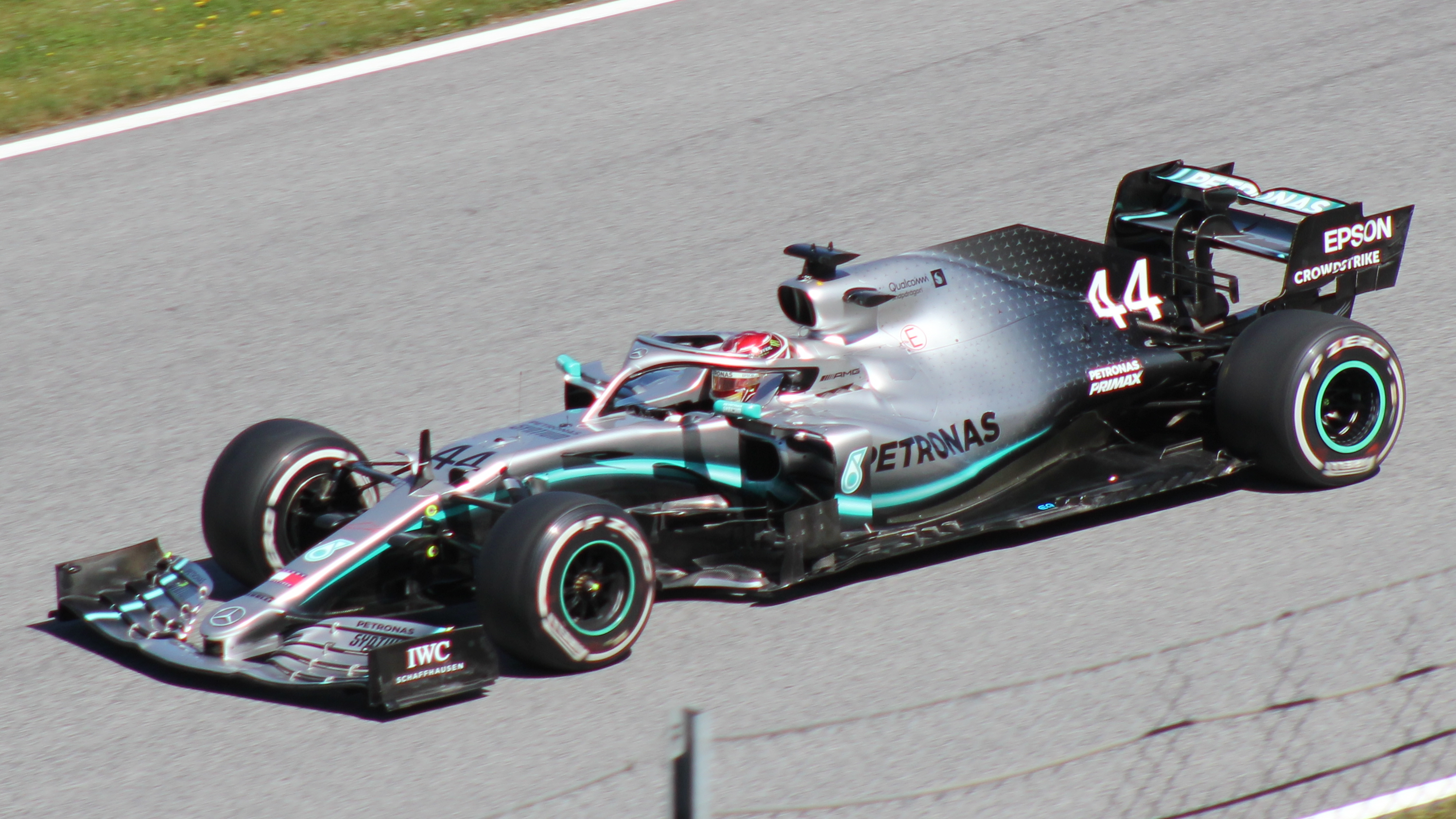 Hamilton beim Rennwochenende in Österreich 2019